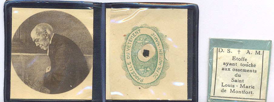 Reliques de saints (souvenir de famille)